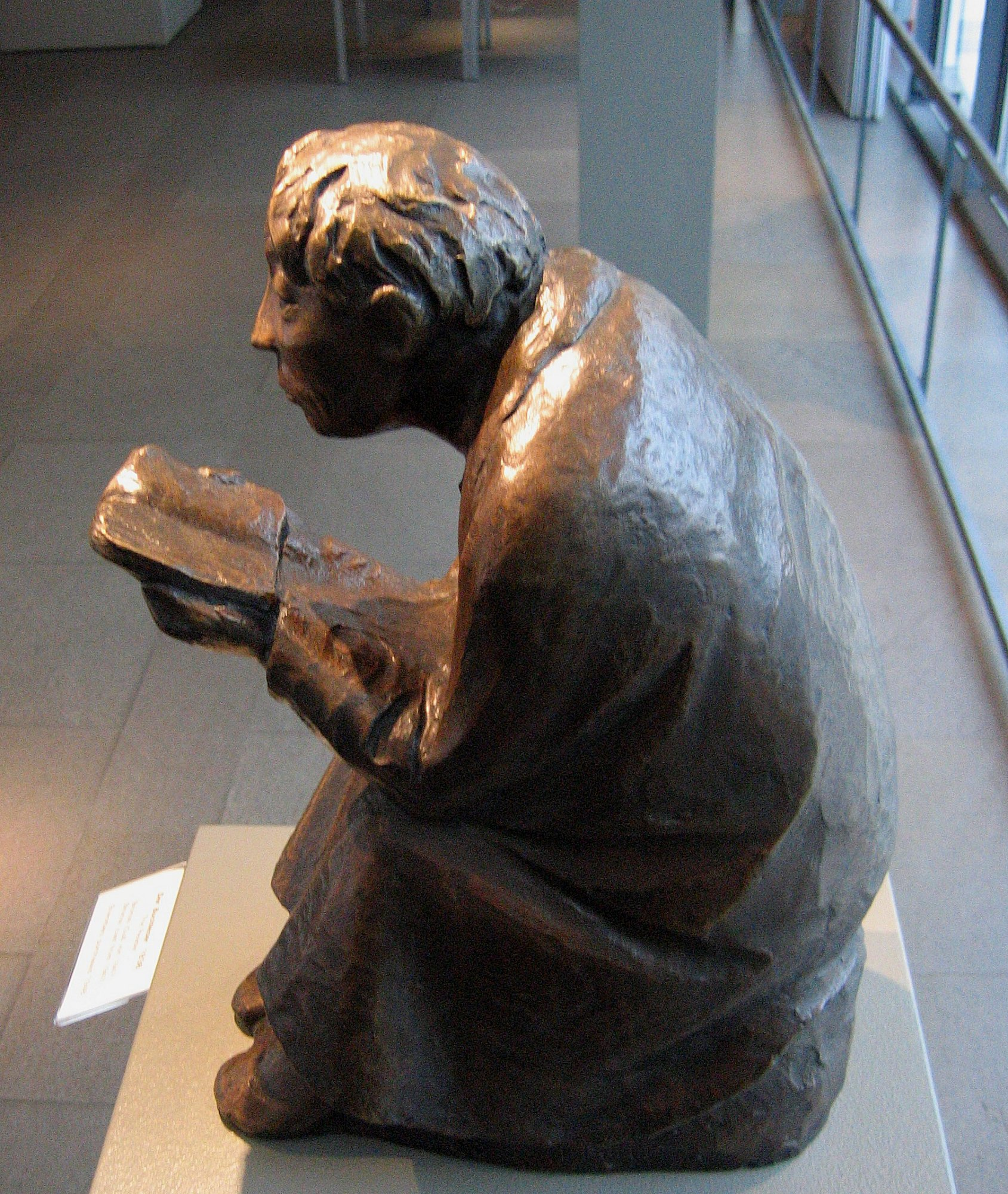 Der Buchleser, Bronze, Ernst Barlach Haus, Hamburg